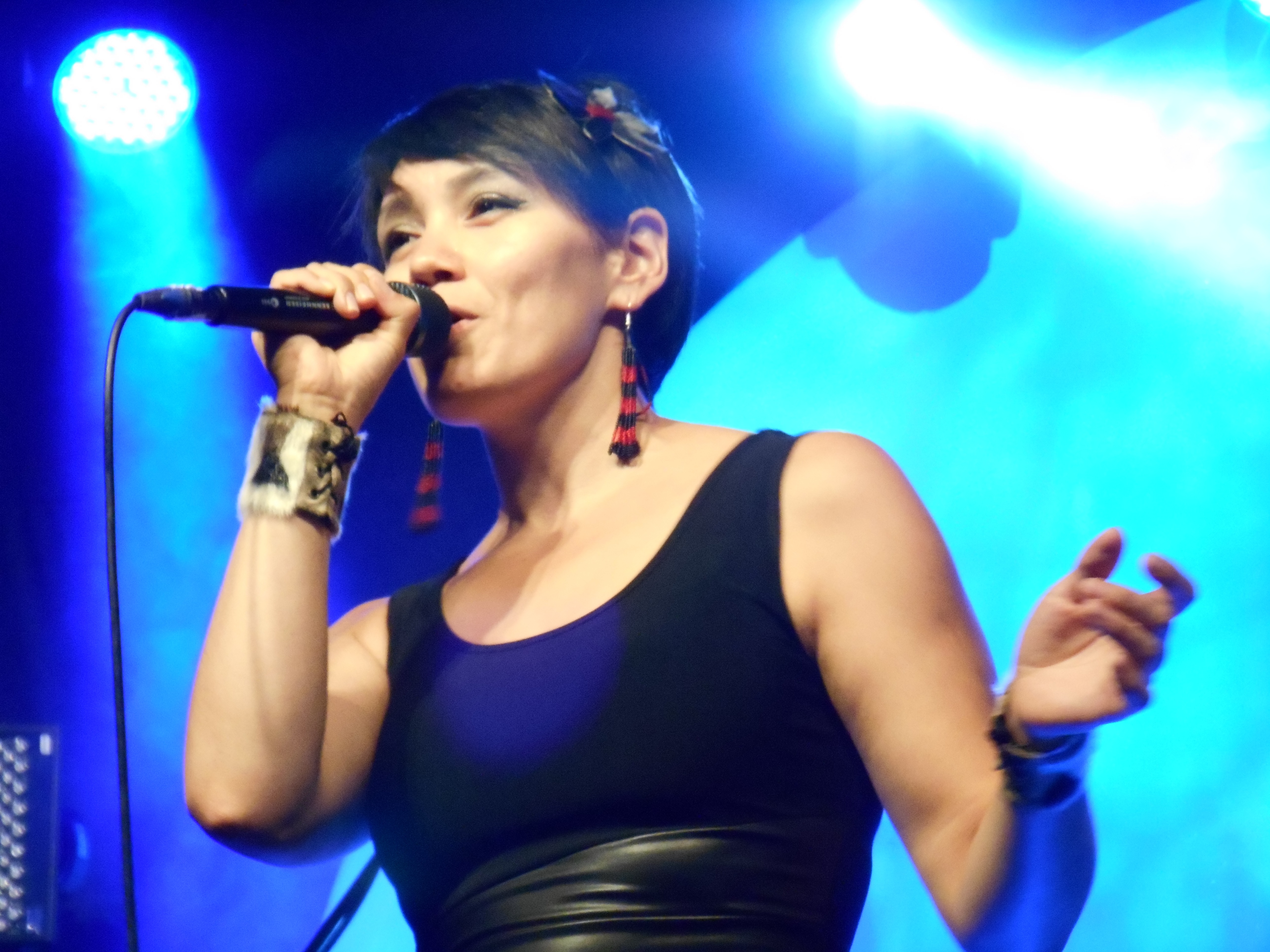 Spectacle de Beatrice Deer, place des Festivals, Montréal